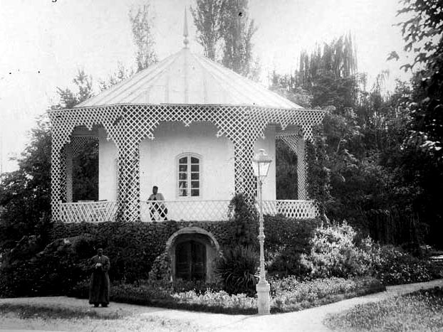 نمایی از باغ و عمارت امین‌الدوله در تهران